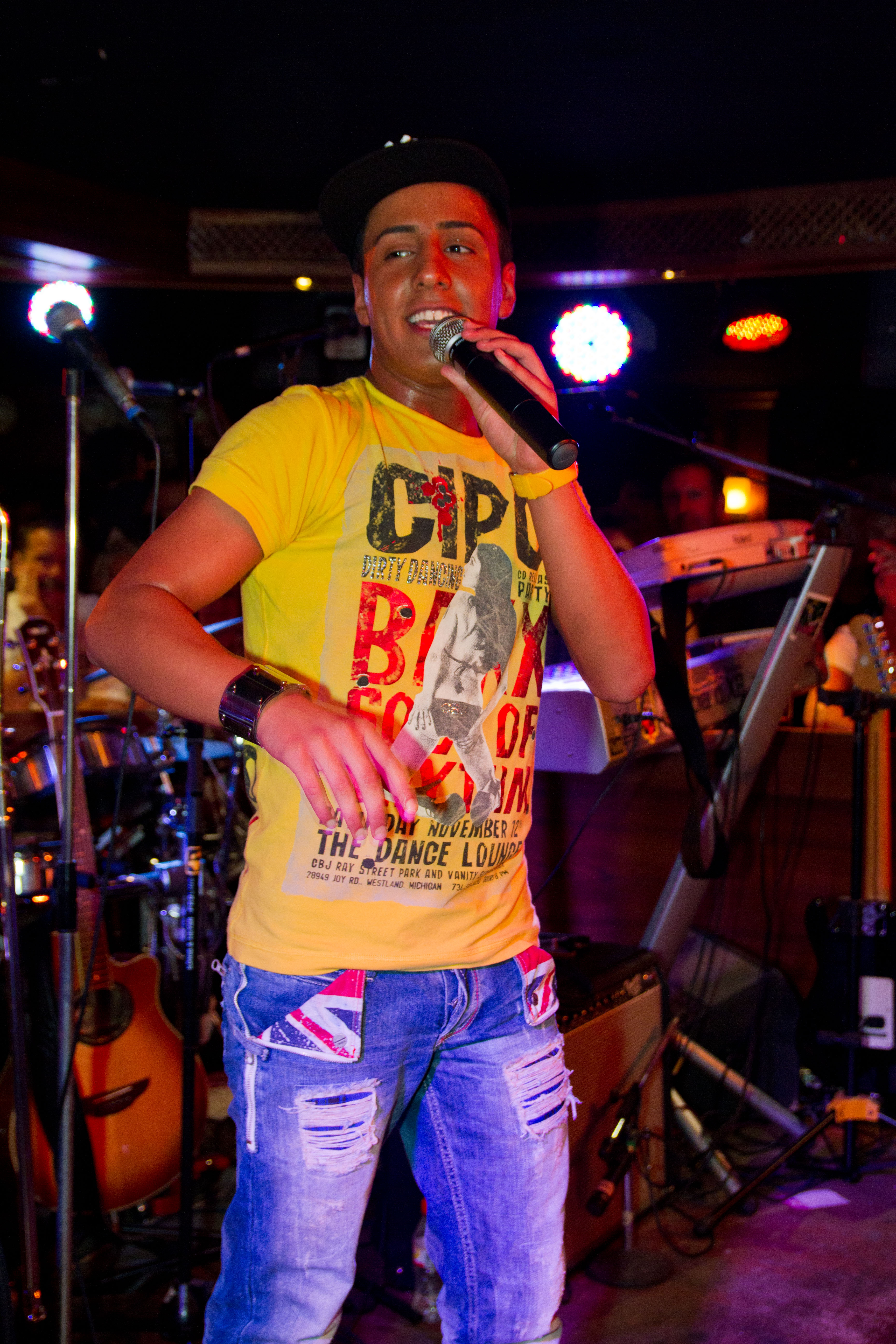 Thomas Karaoglan bei einem Auftritt im Oberbayern auf Mallorca im Mai 2011